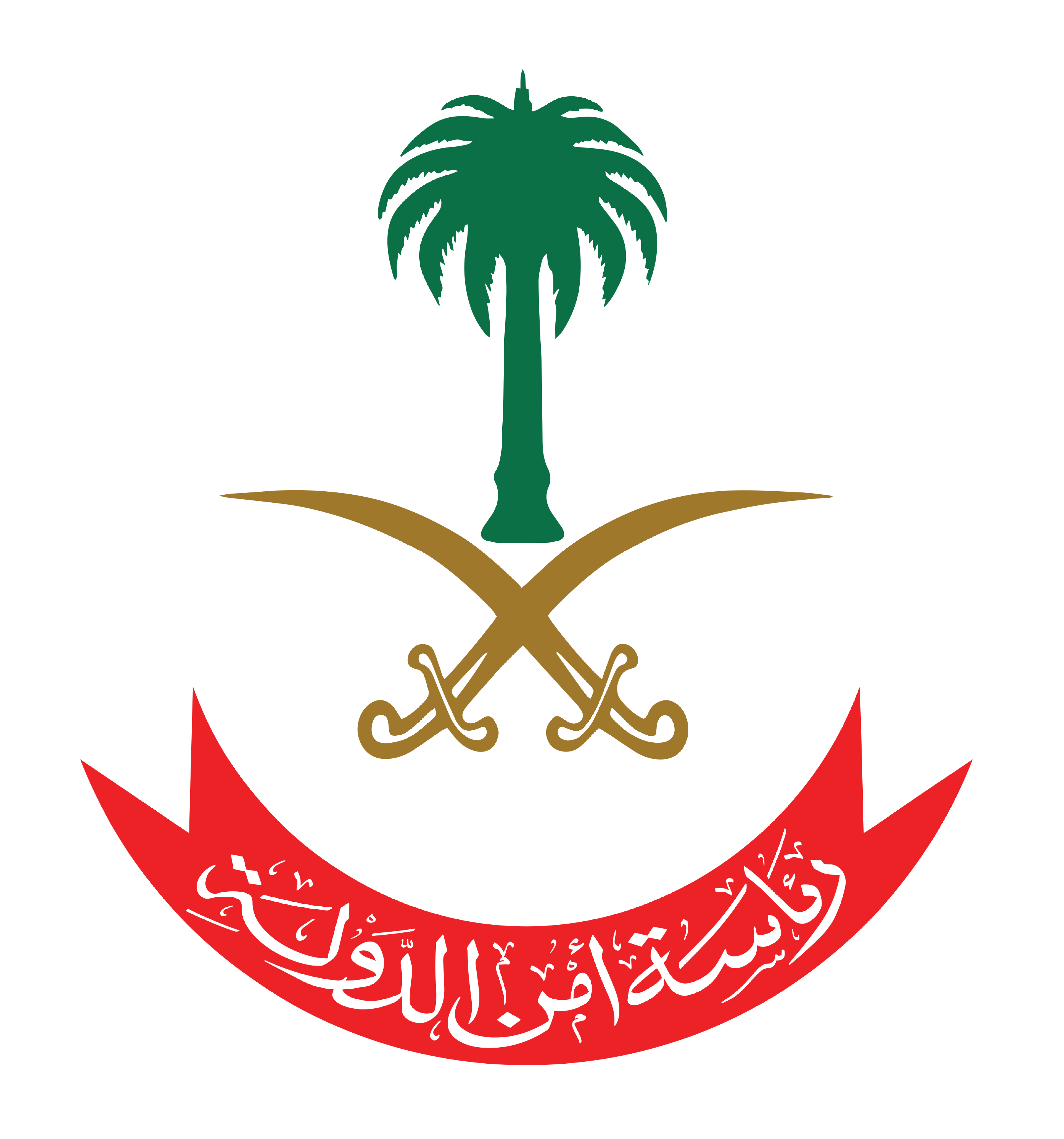 هذا الشعار هو الشعار الصحيح لرئاسة أمن الدولة